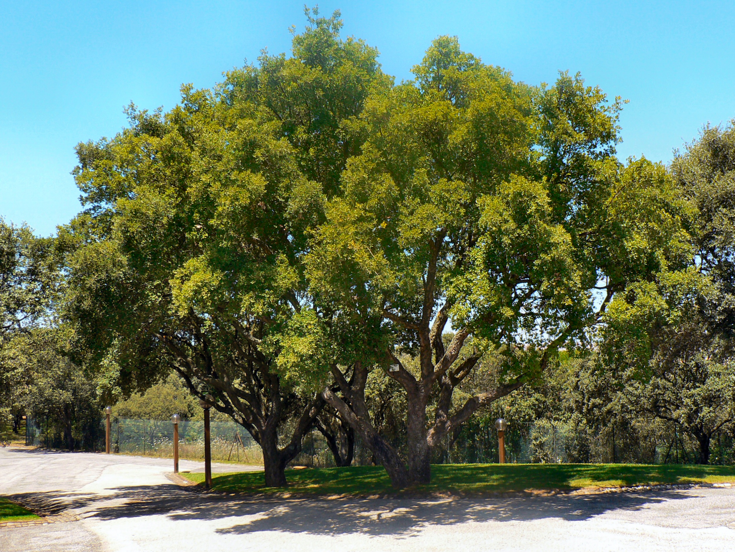 Sobreiro no Parque da Serafina em Lisboa